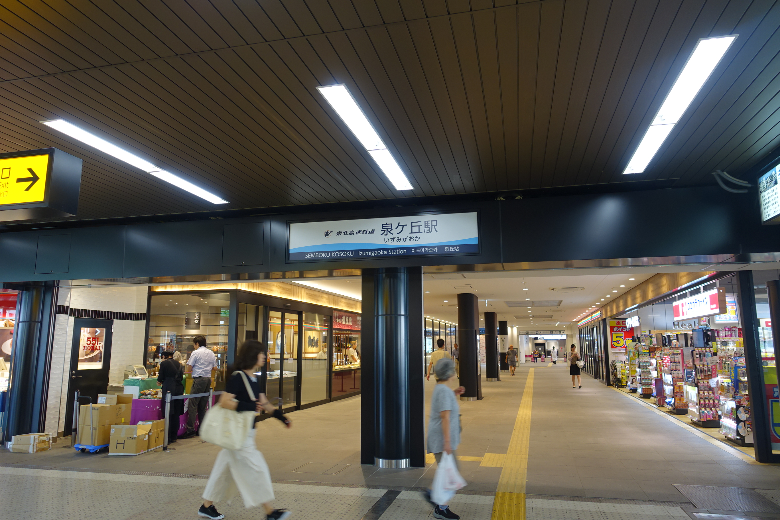 泉北高速鉄道線泉ヶ丘駅 入口（駅舎リニューアル後） Sony Cyber-shot DSC-RX100 Mark III